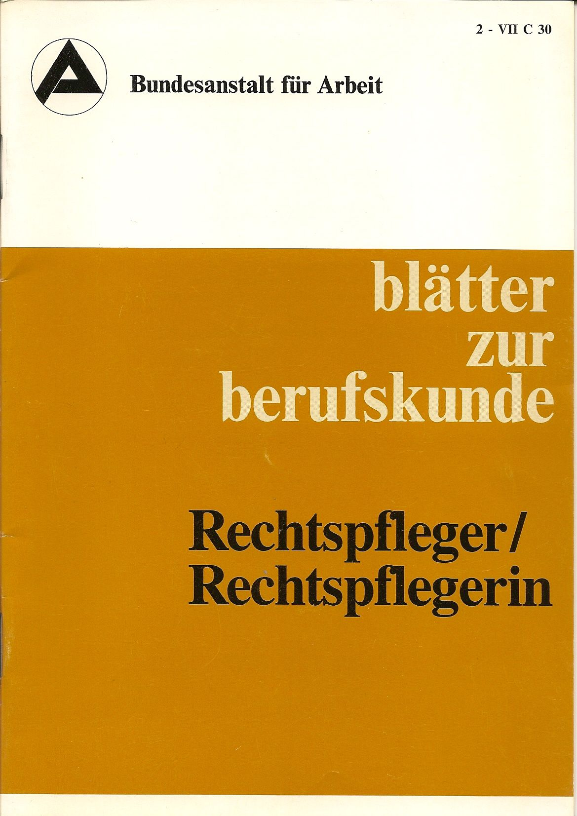 Blätter zur Berufskunde (Rechtspfleger/Rechtspflegerin, braun). Die Umschlagfarben der Reihe variieren nach Berufsgruppen.